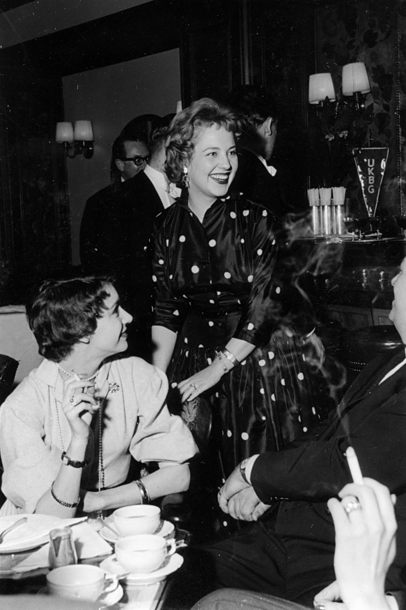 Lonny Kellner (in der Mitte) bei einer Veranstaltung in Frankfurt am Main anlässlich der Veröffentlichung des Films "Musik, Musik und nur Musik"